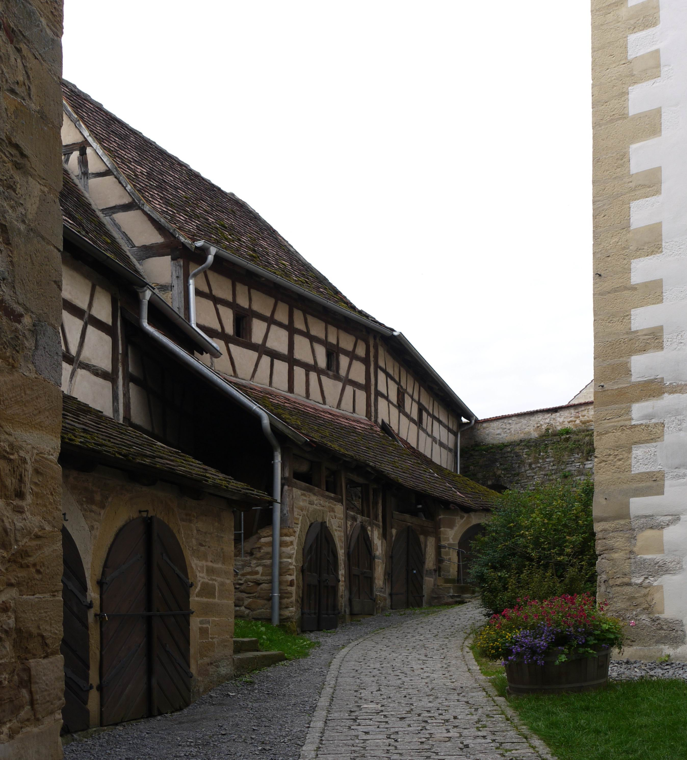 Kirchenburg Mönchsondheim: Gaden links der Kirche